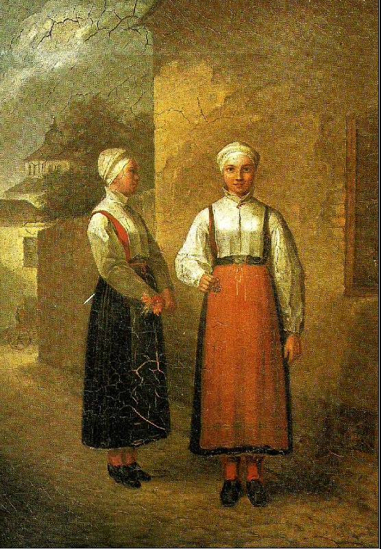 Gjengivelse av Fredrik Westins oljemaleri fra 1832. Det viser to Mora-kvinner som selger hårblomster (i følge Björklund: "Indor i Våmhus socken", s. 127) og ringer av hestetagl (kvinner t.h.) Originalen finnes i Nordiska museet, Stockholm